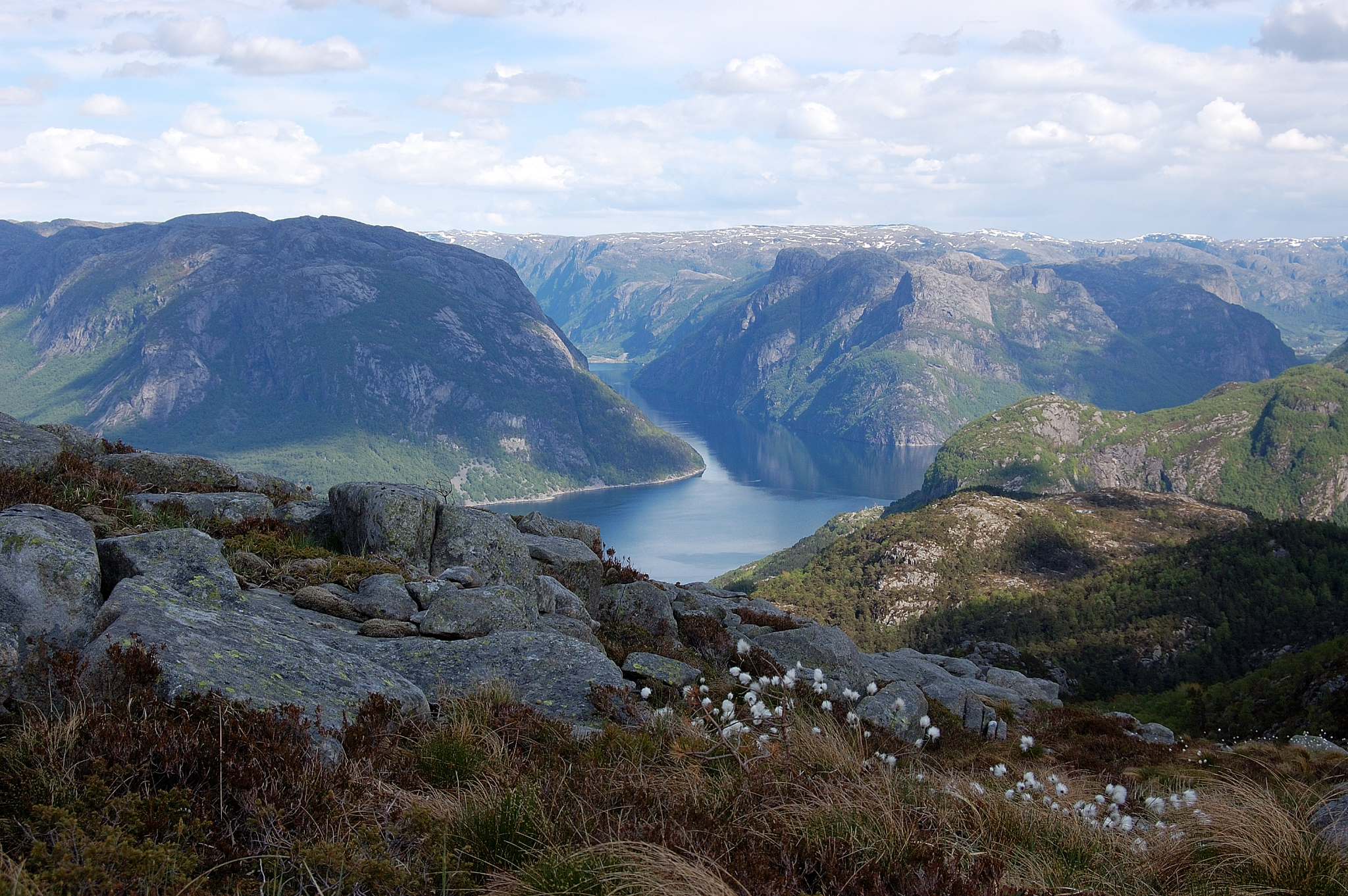 Høgsfjorden fremst, Frafjorden vidare innover i biletet